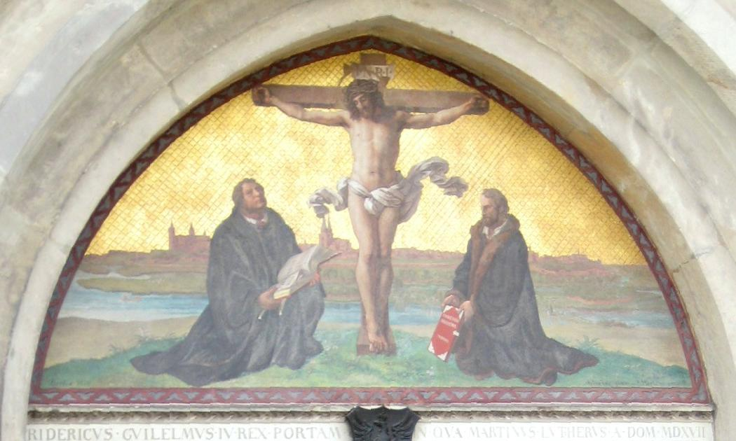 Wittenberg, Schlosskirche, Tympanon der "Thesentür" (19. Jahrhundert): Martin Luther (mit der deutschen Bibel) und Philipp Melanchthon (mt dem Augsburger Bekenntnis) knien beim gekreuzigten Christus; im Hintergrund die spätmittelalterliche Silhouette von Wittenberg